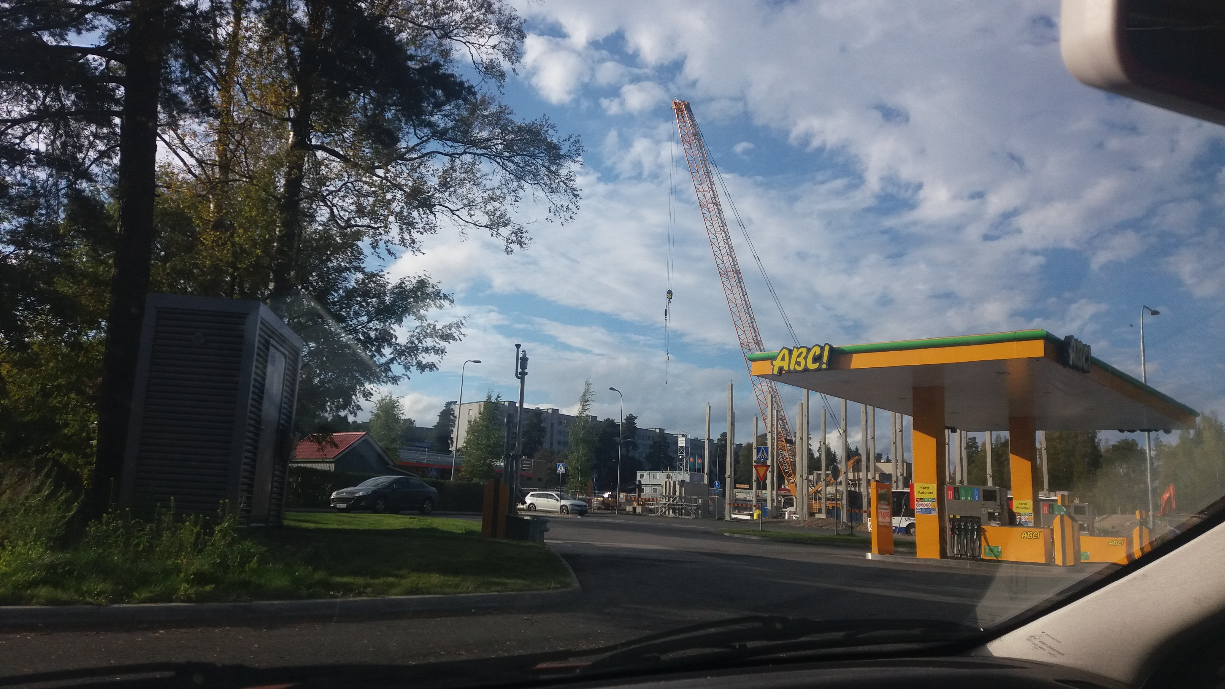 Kuvassa on rakenteilla uusi ostoskeskus ja etualalla vanha huoltoaseman tontti, mistä rakennus on purettu ja tilalle on tullut uusi kylmäasema.